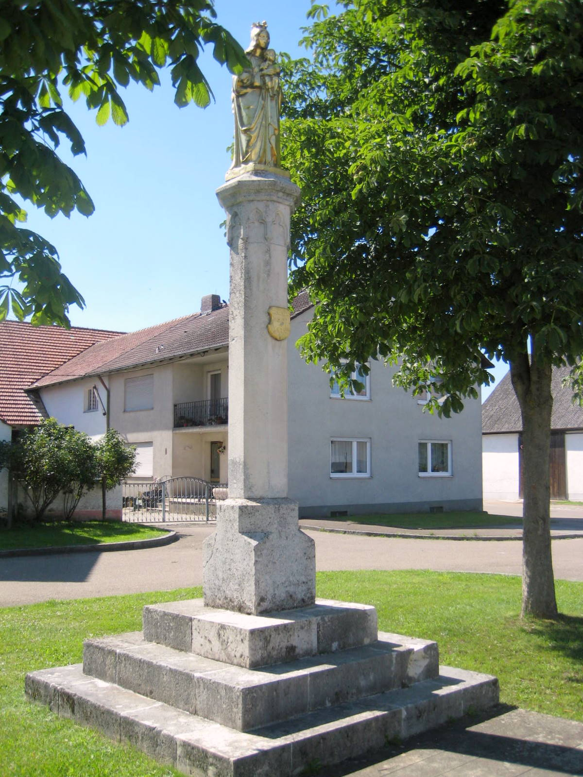 Münchsmünster ist eine Gemeinde des LKr. Pfaffenhofen a.d. Ilm.